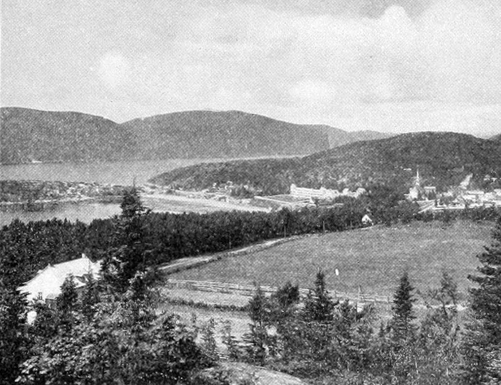 Tadoussac, Quebec (1900).